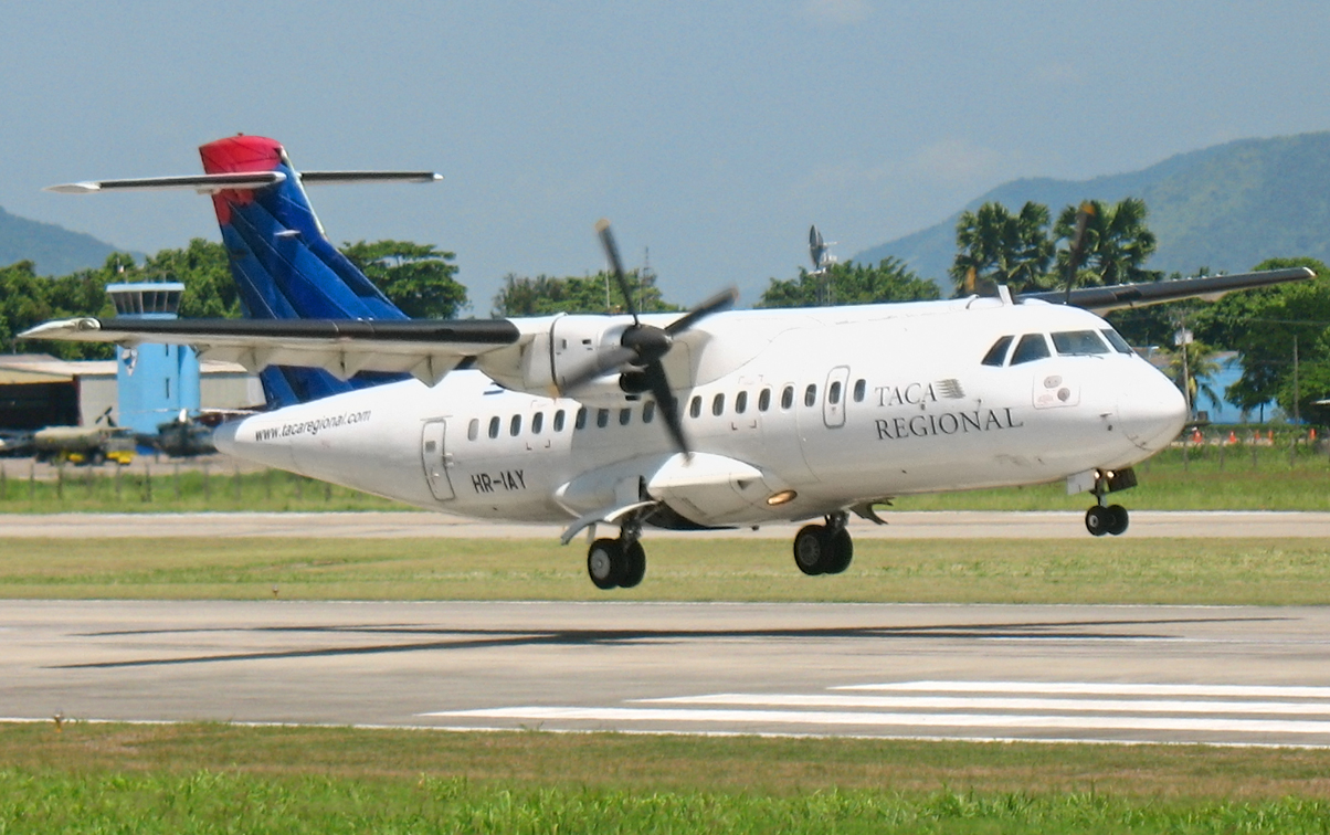 HR-AIY